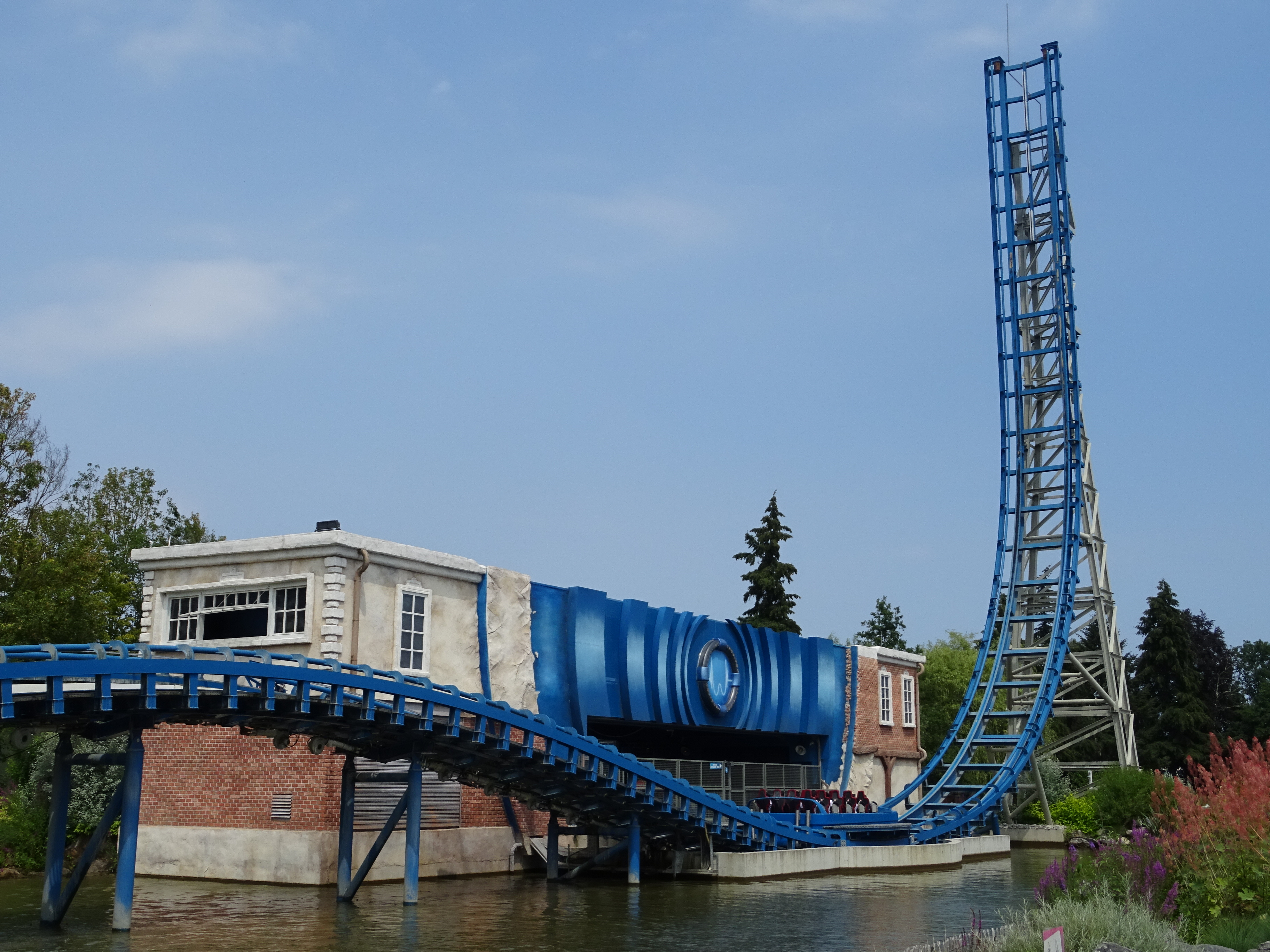 Pulsar à Walibi Belgium